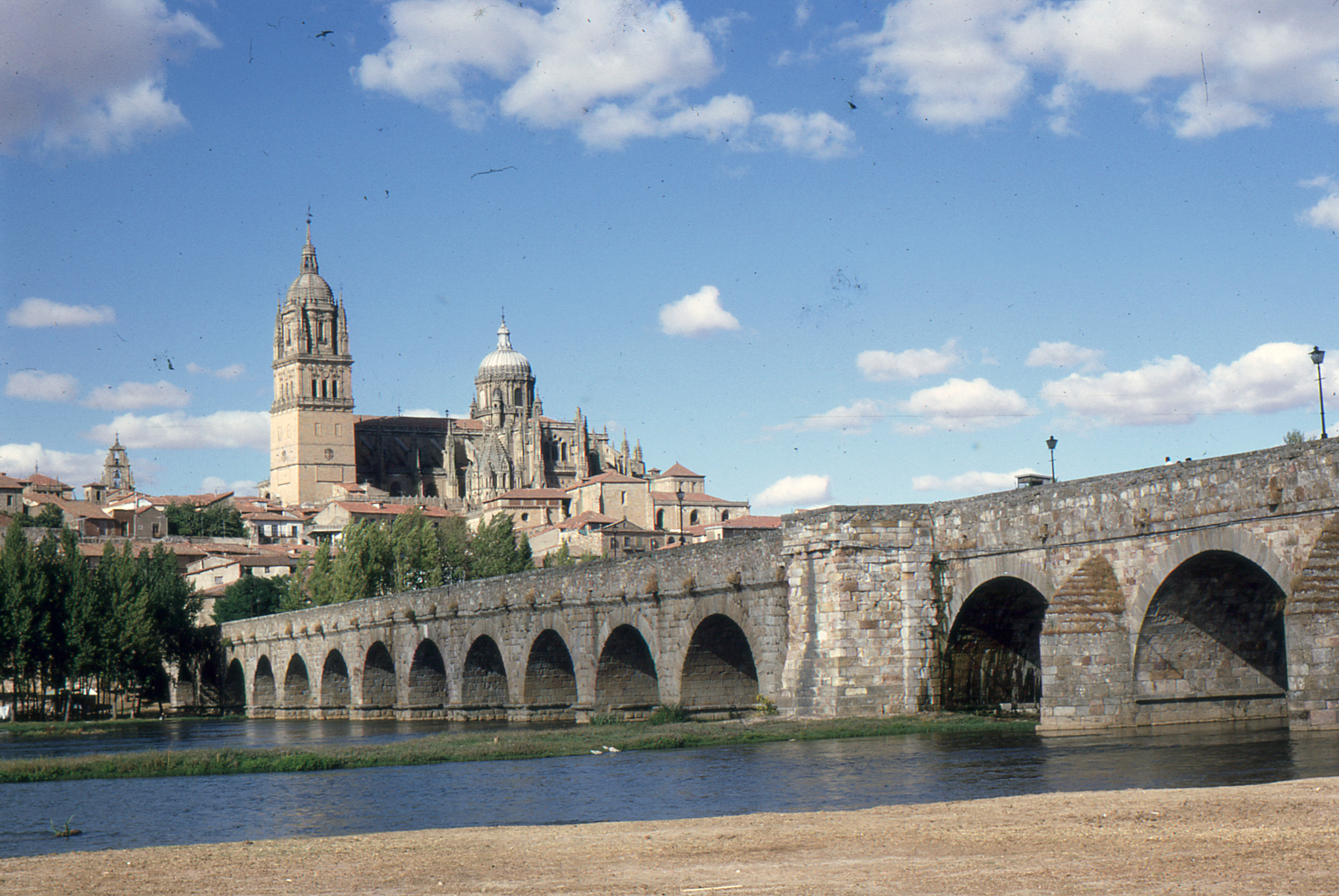 Cathédrale.